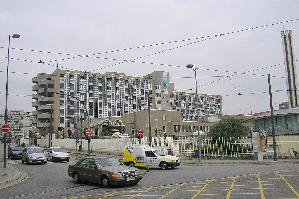 "Santo António" hospital (modern block) in Porto, Portugal